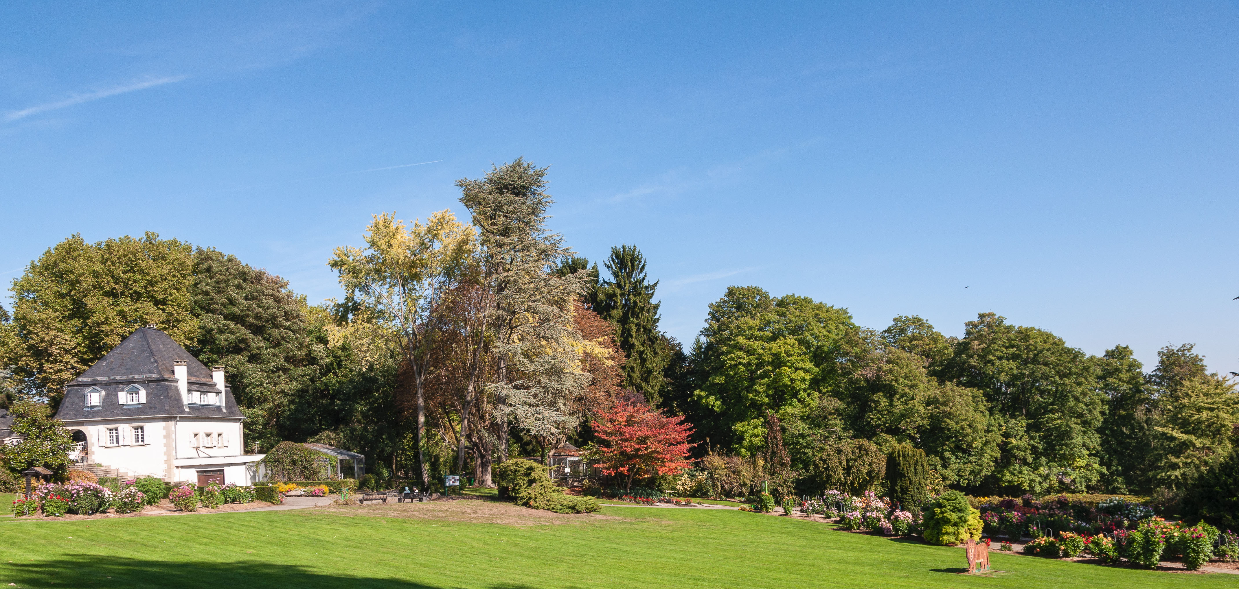 Jardins et arbres divers du parc botanique de Mulhouse